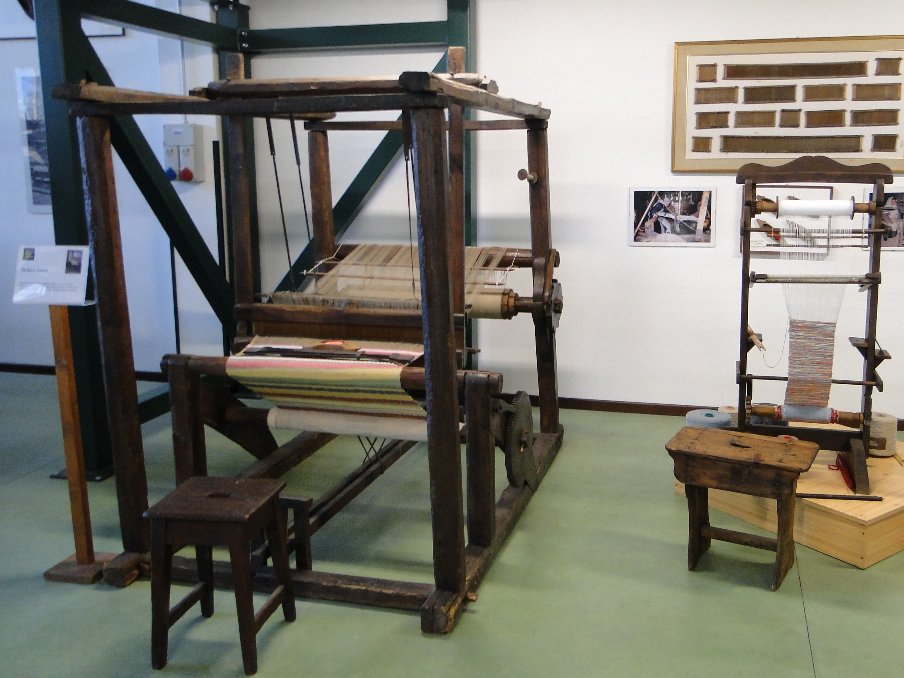 Museo del telaio. Leffe (BG). Italy